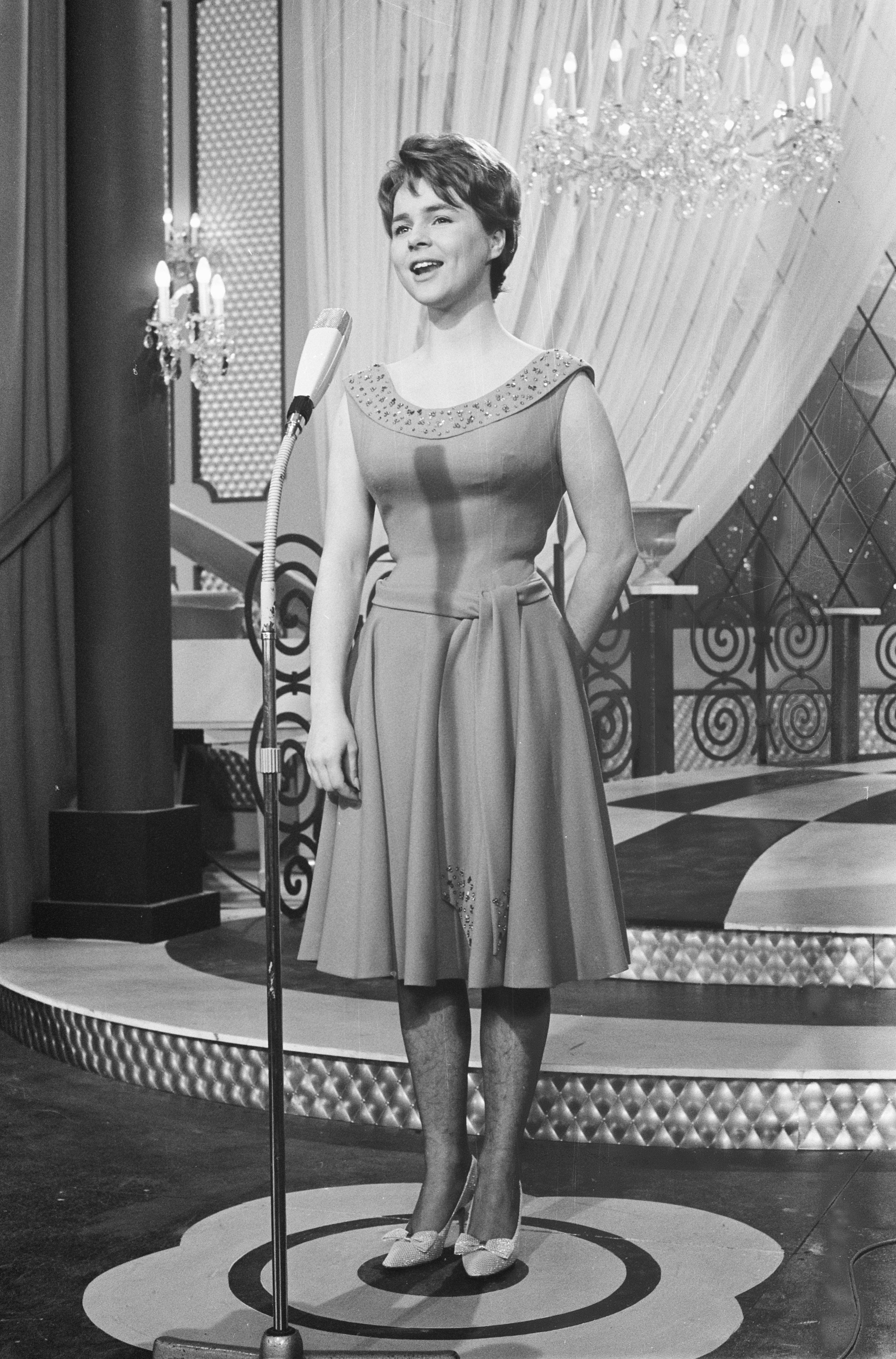 Collectie / Archief : Fotocollectie Anefo Reportage / Serie : [ onbekend ] Beschrijving : Eurovisie Songfestival 1962 te Luxemburg, voor Duitsland Conny Froboes Datum : 18 maart 1962 Locatie : Luxemburg Trefwoorden : artiesten, songfestivals Persoonsnaam : Froboes Conny Fotograaf : Pot, Harry / Anefo Auteursrechthebbende : Nationaal Archief Materiaalsoort : Negatief (zwart/wit) Nummer archiefinventaris : bekijk toegang 2.24.01.05 Bestanddeelnummer : 913-6614